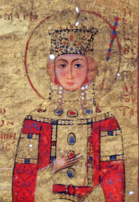 Мария Антиохийская, супруга византийского императора Мануила I Комнина